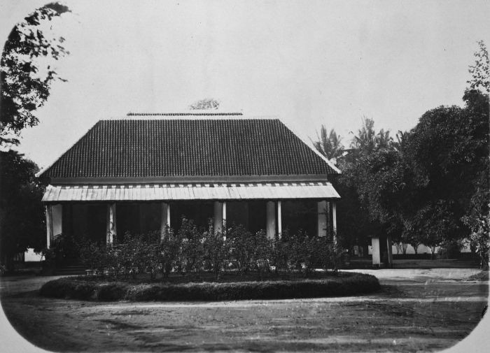 Foto. Met inkt geschreven l.b. op het karton: No. 1.. Assistent-residentswoning te Tuban